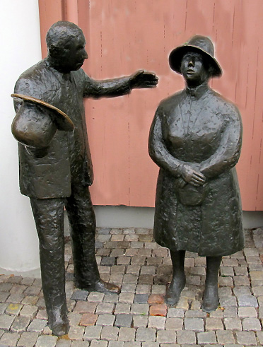 Staty föreställandes figurerna Kal och Ada vid entrén till Liseberg i Göteborg